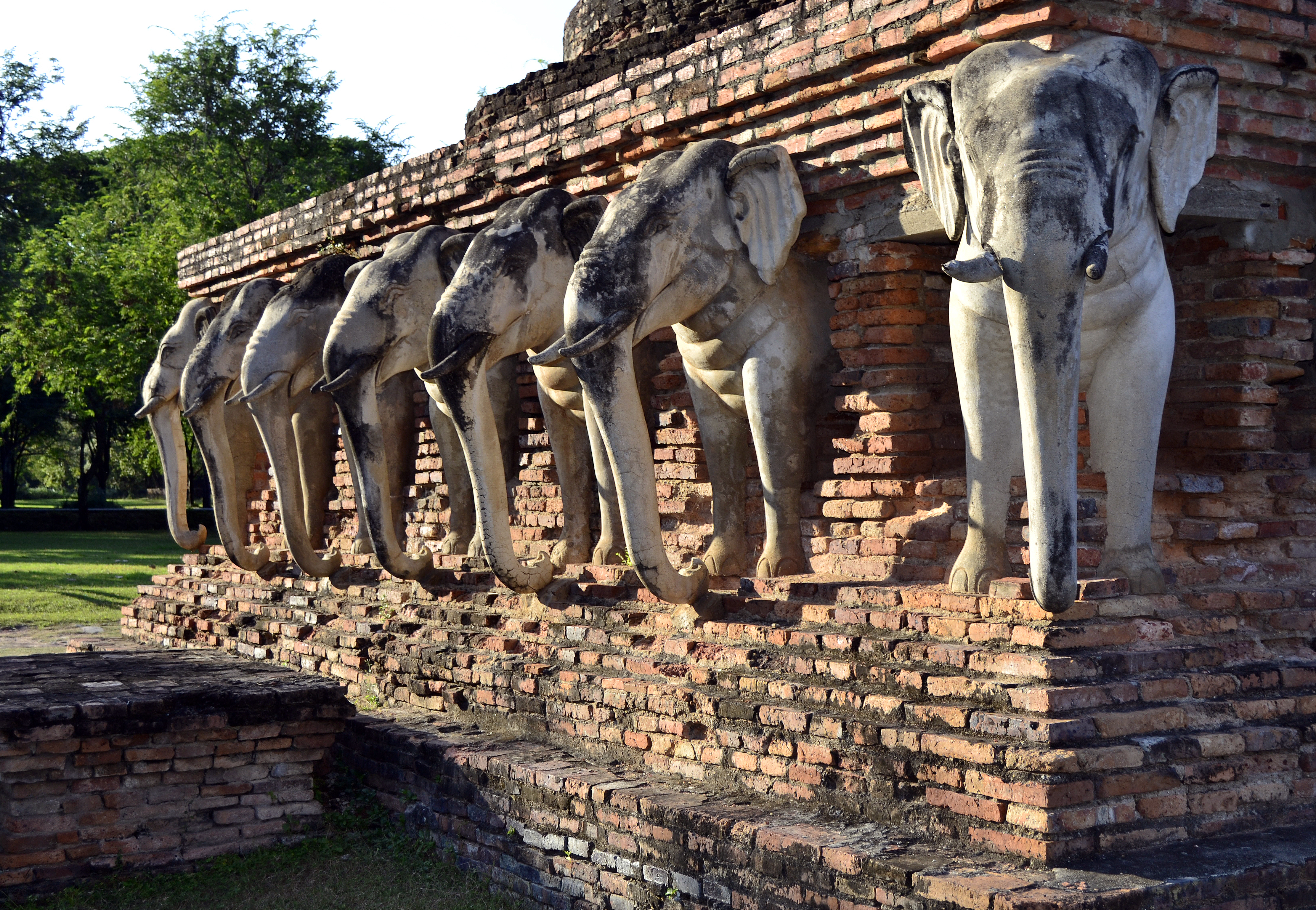 Wat Sorasan im Geschichtspark Sukhothai